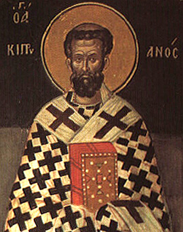 Russische Ikone: Cyprian von Karthago Heiligenlexikon.de Bild wurde freundlicherweise vom ÖHL "gemeinfrei gestellt" [1]